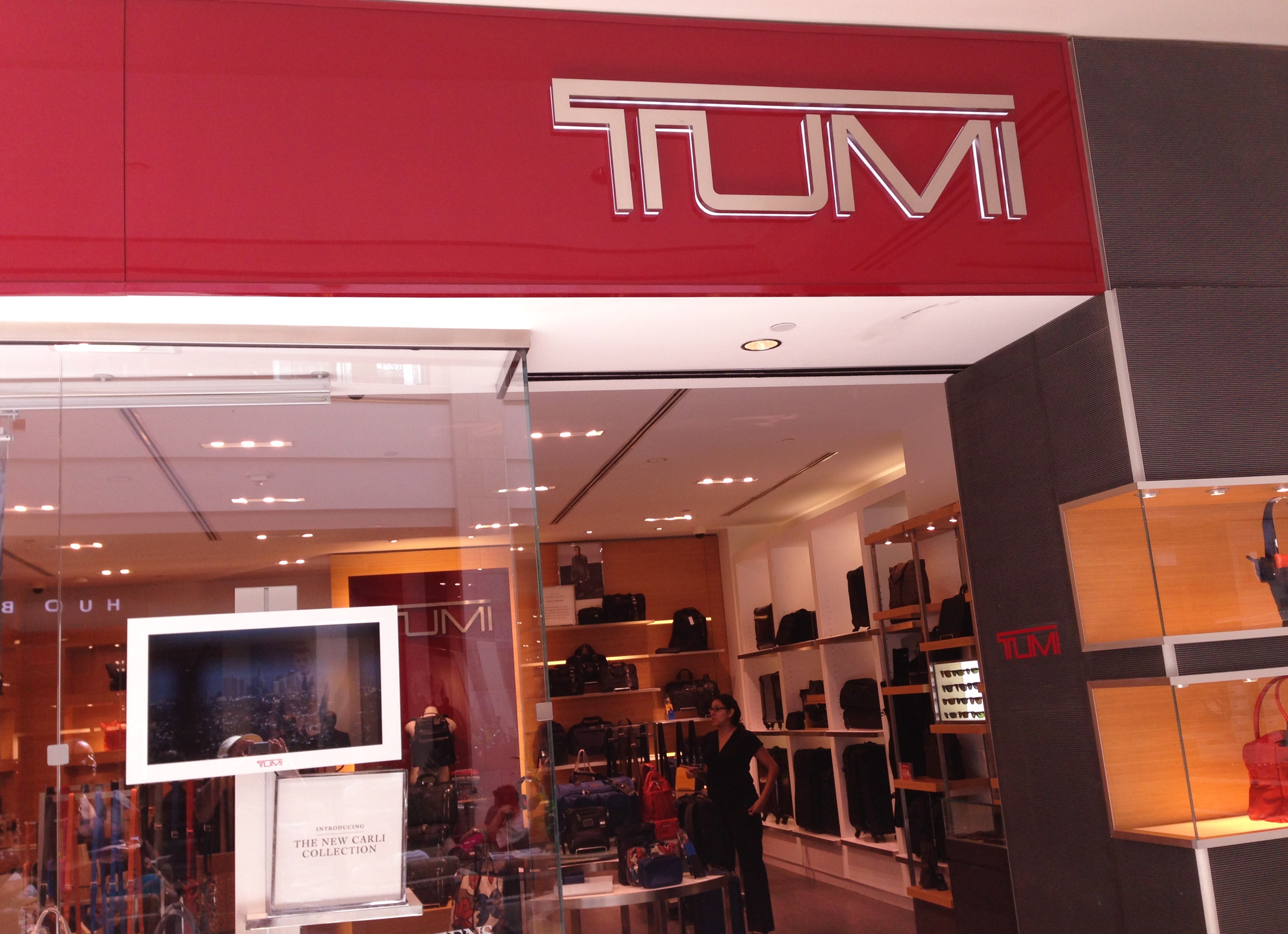 TUMI